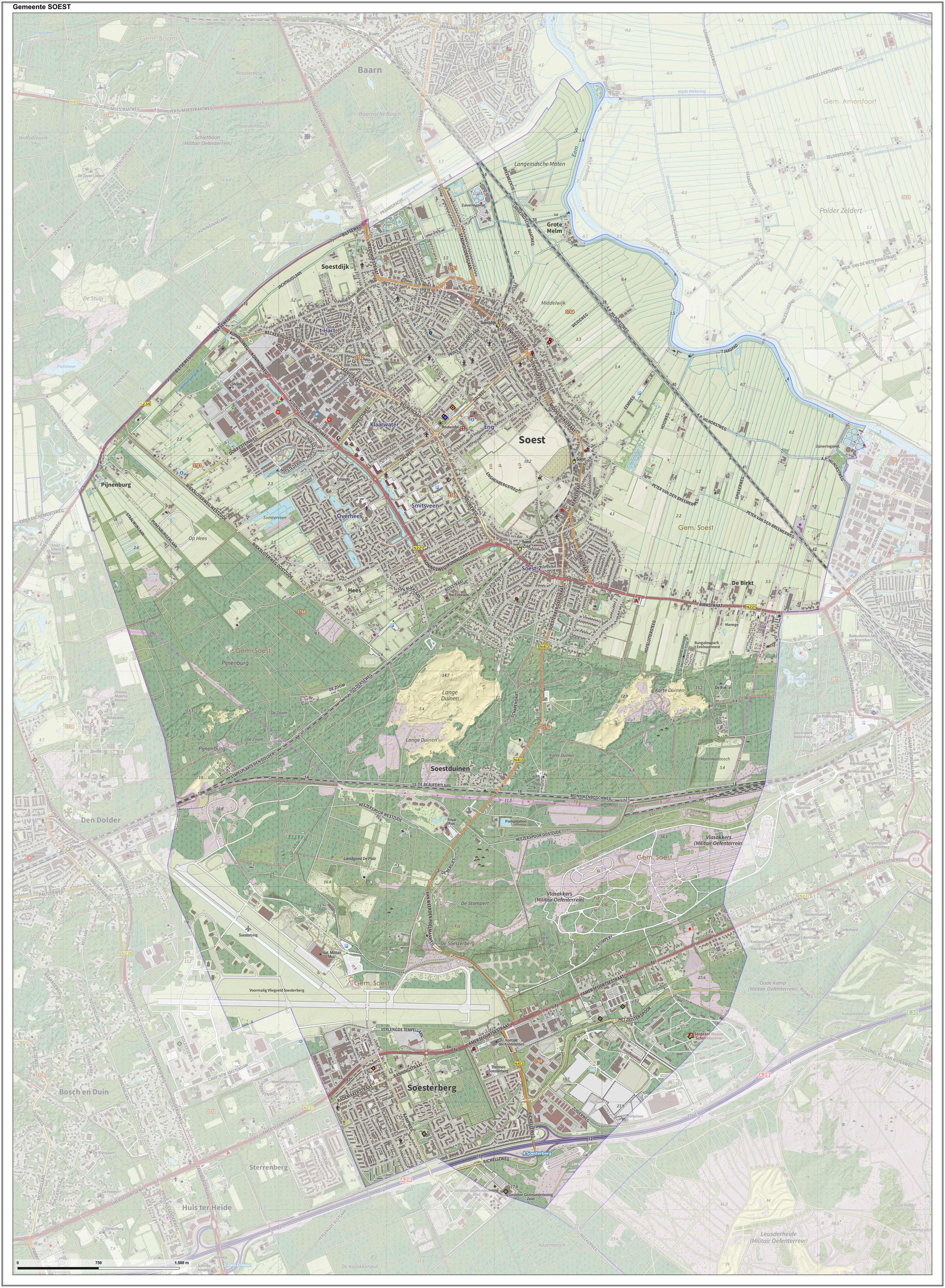 Topografische gemeentekaart. Resolutie: 400 pixels/km. Kaartbeeld samengesteld uit de open geodata van de Top10NL en Top25namen (Kadaster), Creative Commons-BY licentie. Gebouwvlakken uit open geodata BAG extract. Wegen uit de OpenStreetMap, OpenStreetMap community. Reliëfschaduw uit de Actuele Hoogtekaart AHN2. Samenstelling en kleurenschema: Jan-Willem van Aalst, met QGIS. Zie ook de Legenda.